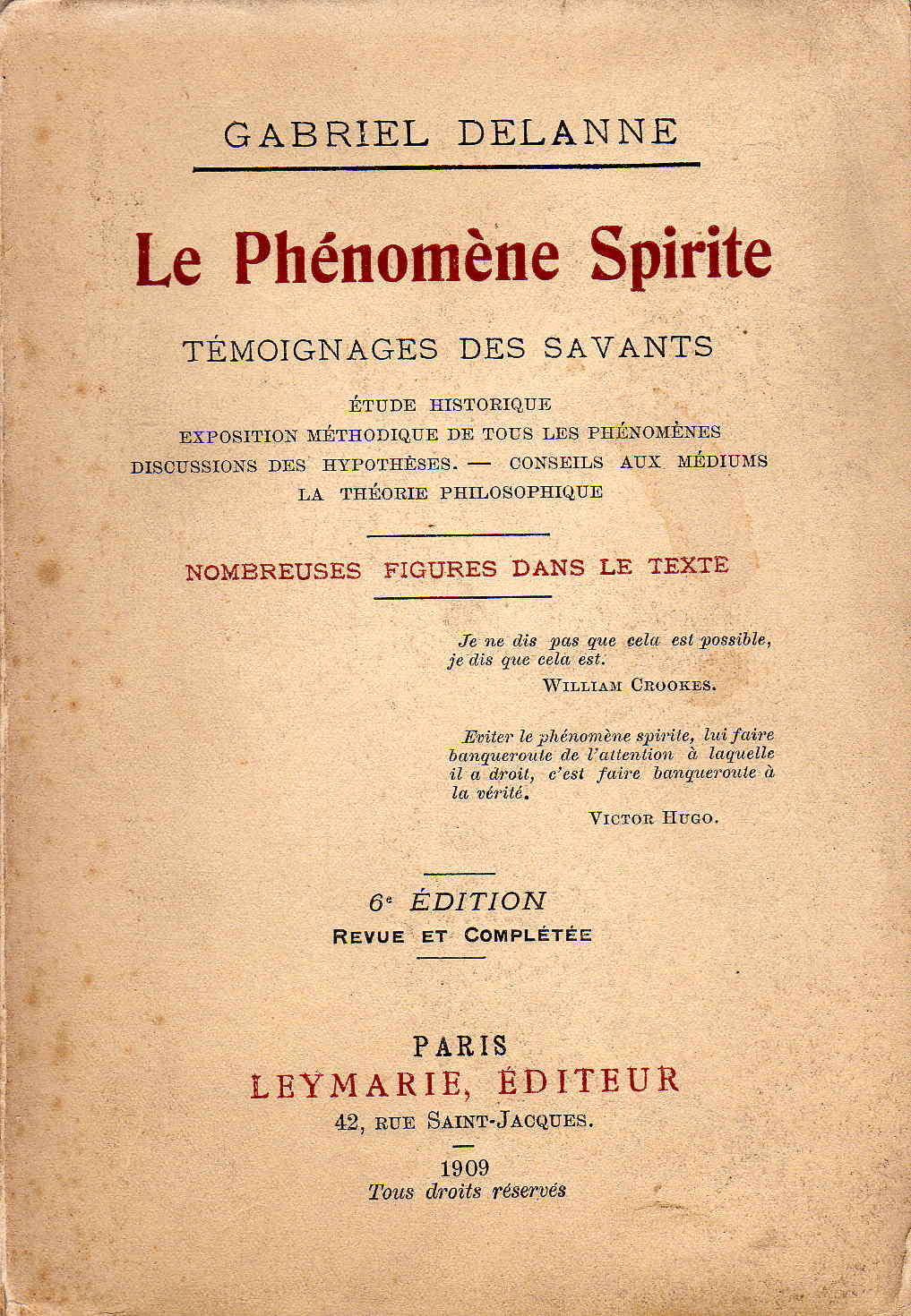 Livre de 1909. L'auteur (Gabriel Delanne) est décédé en 1926. Si quelqu'un a des droit sur l'image de cette couverture de livre, je m'engage Ã lui offrir une bouteille du meilleur champagne (c'est une promesse). Amicalement.27 août 2008 à 20:43 (CEST) Le nom de l'auteur est indique sur l'image, en haut, au centre. L'auteur est décédé il y a 82 ans. FFFFFF6 (d) 24 septembre 2008 à 10:05 (CEST)